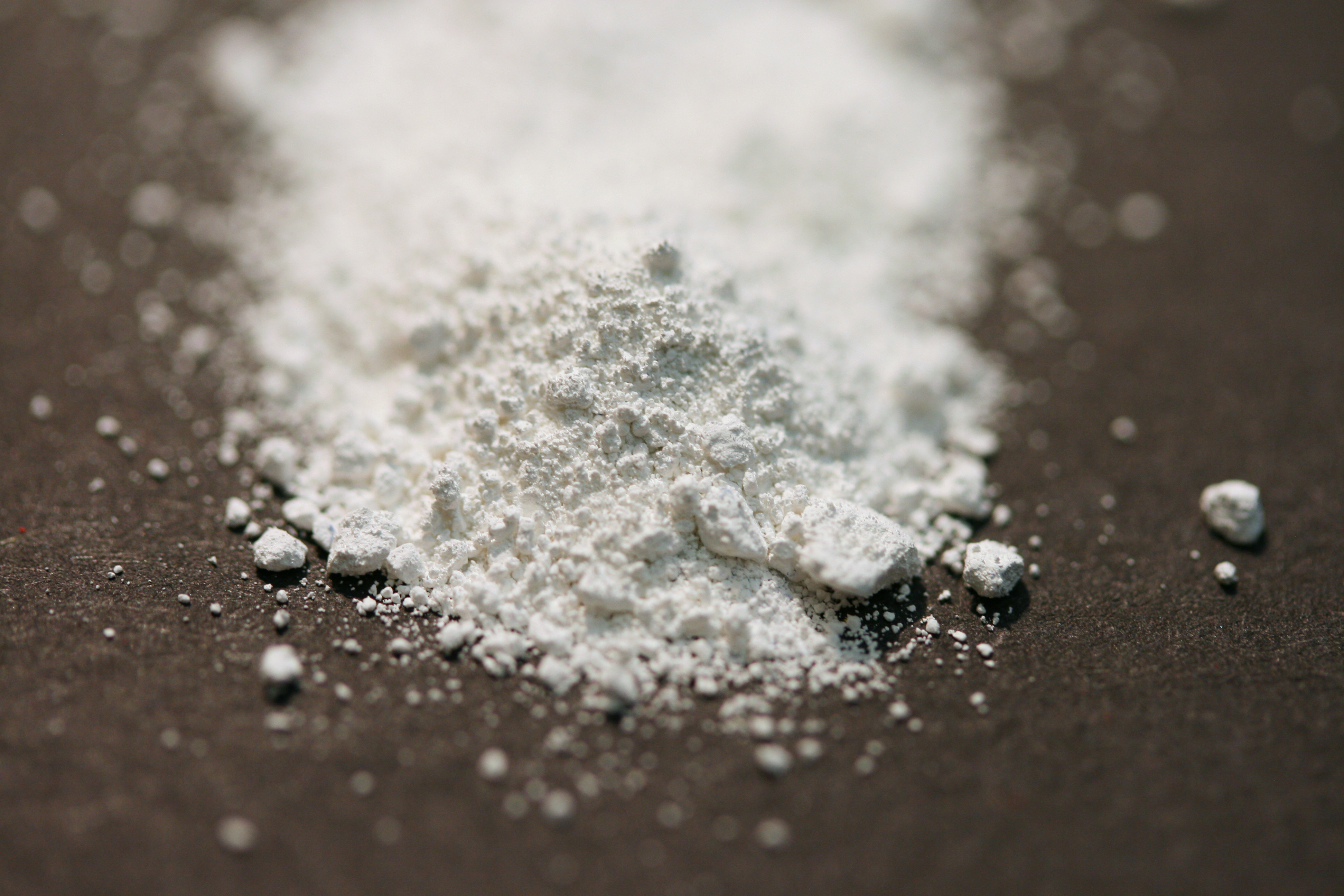 Titanweiß